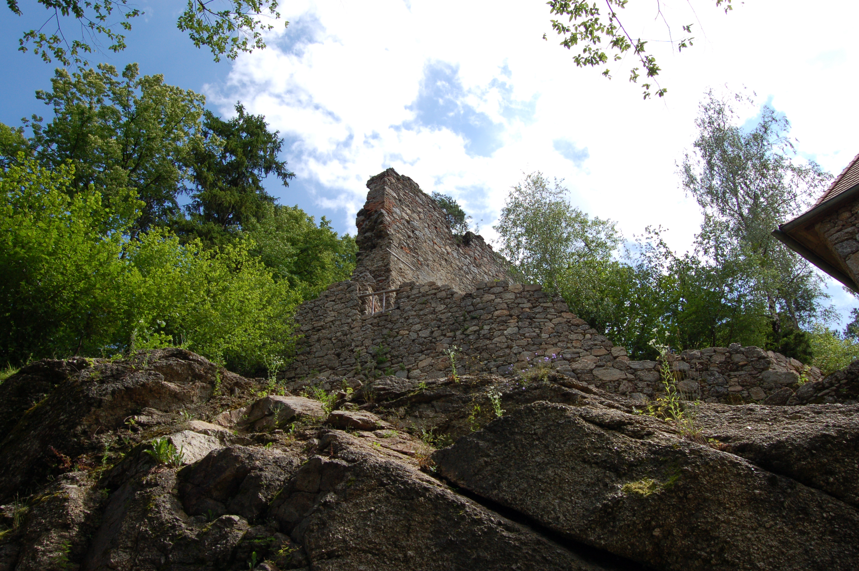 Die Ruine Oberwallsee in der Gemeinde Feldkirchen an der Donau im Bezirk Rohrbach (Oberösterreich).